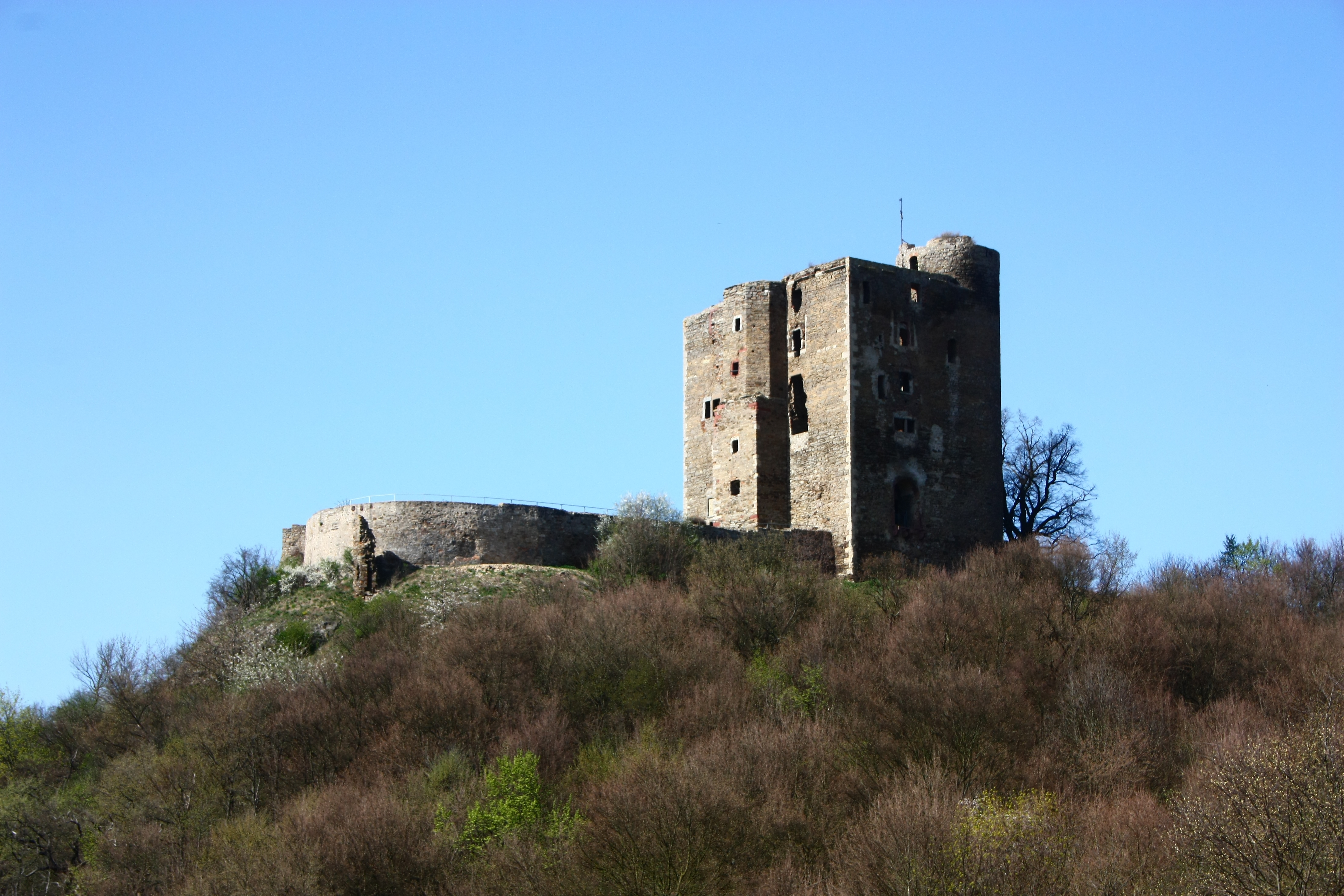 Blick von der Unterburg auf die Burg Arnstein